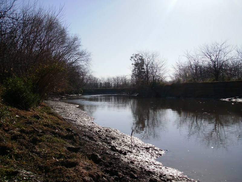 Vista del Río Luján dentro de la reserva natural estricta Otamendi.